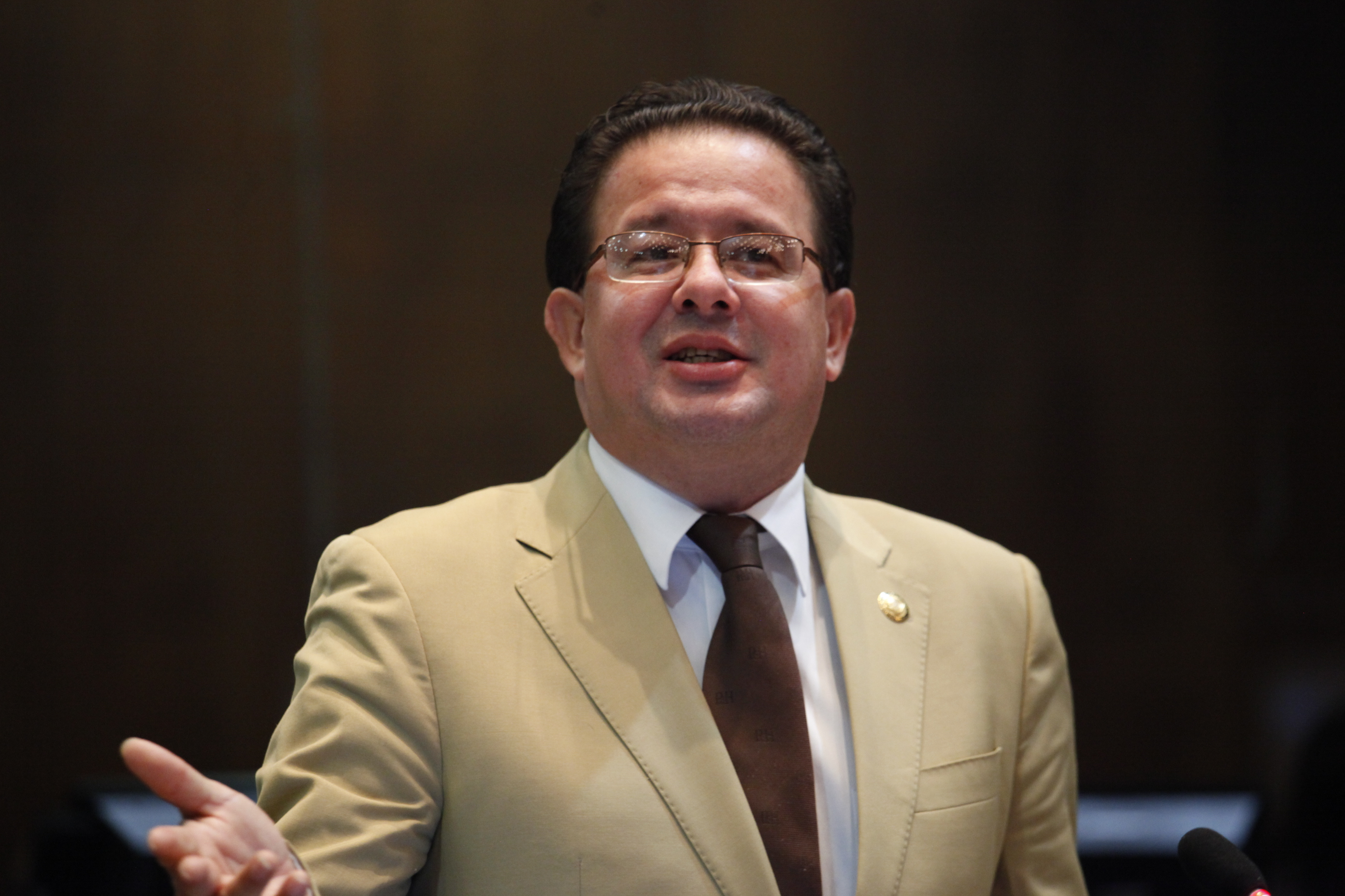 23 abril de 2015.- Segundo debate del proyecto de Ley Orgánica de Régimen Especial de la Provincia de Galápagos #LeyGalápagos Fotografía: Hugo Ortiz / Asamblea Nacional